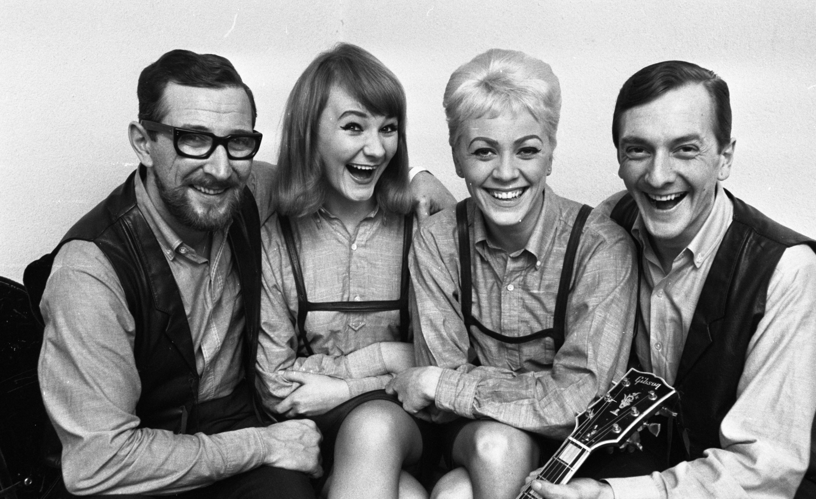 Den svenska popgruppen Family Four i 1966: Berndt Öst (1930–2017), Siw Öst (1941–1992), Inger Öst (f. 1949) Inger Öst (1940–1966). Denna schlagerkvartett bildades 1964 av familjen Öst (halvsyskonen Berndt, Inger, Siw och Stig) i Göteborg, men skulle genom åren komma att växla medlemmar med jämna mellanrum, bland annat efter Stigs trafikdöd 1966. Gruppen splittrades och ombildades mot slutet av 1970-talet.